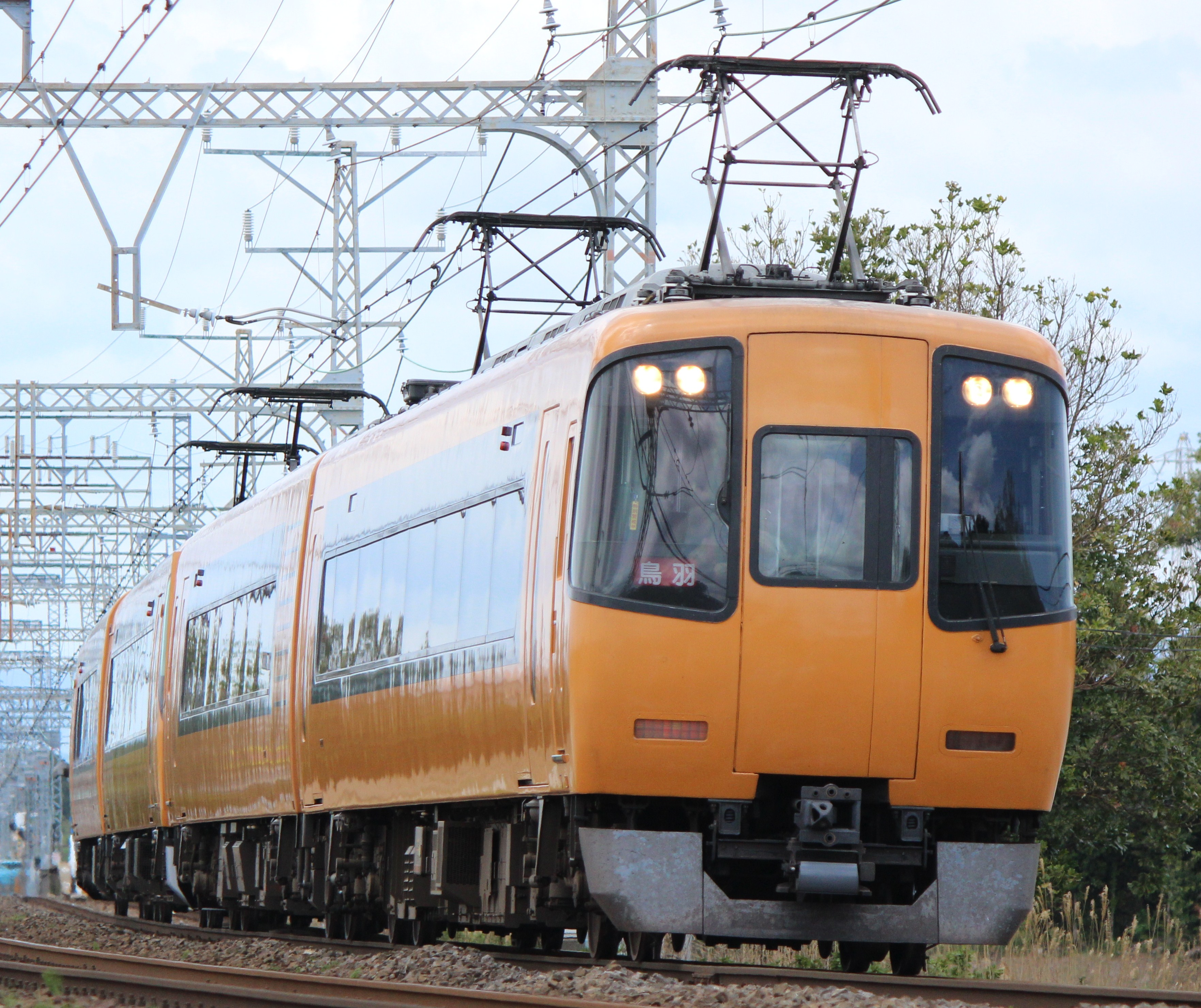 近鉄22000系